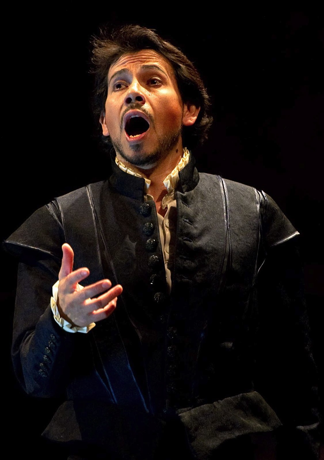 Tenor